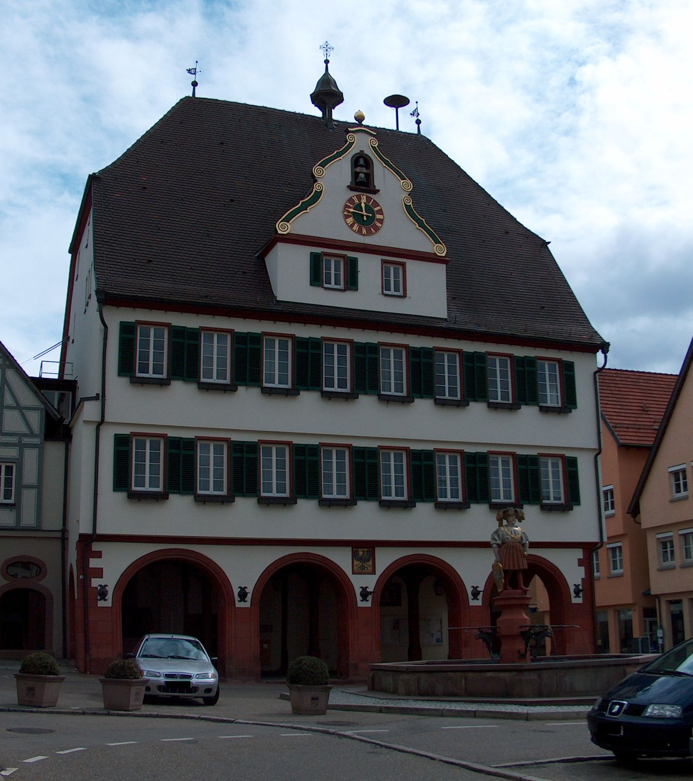 Rathaus Weil der Stadt